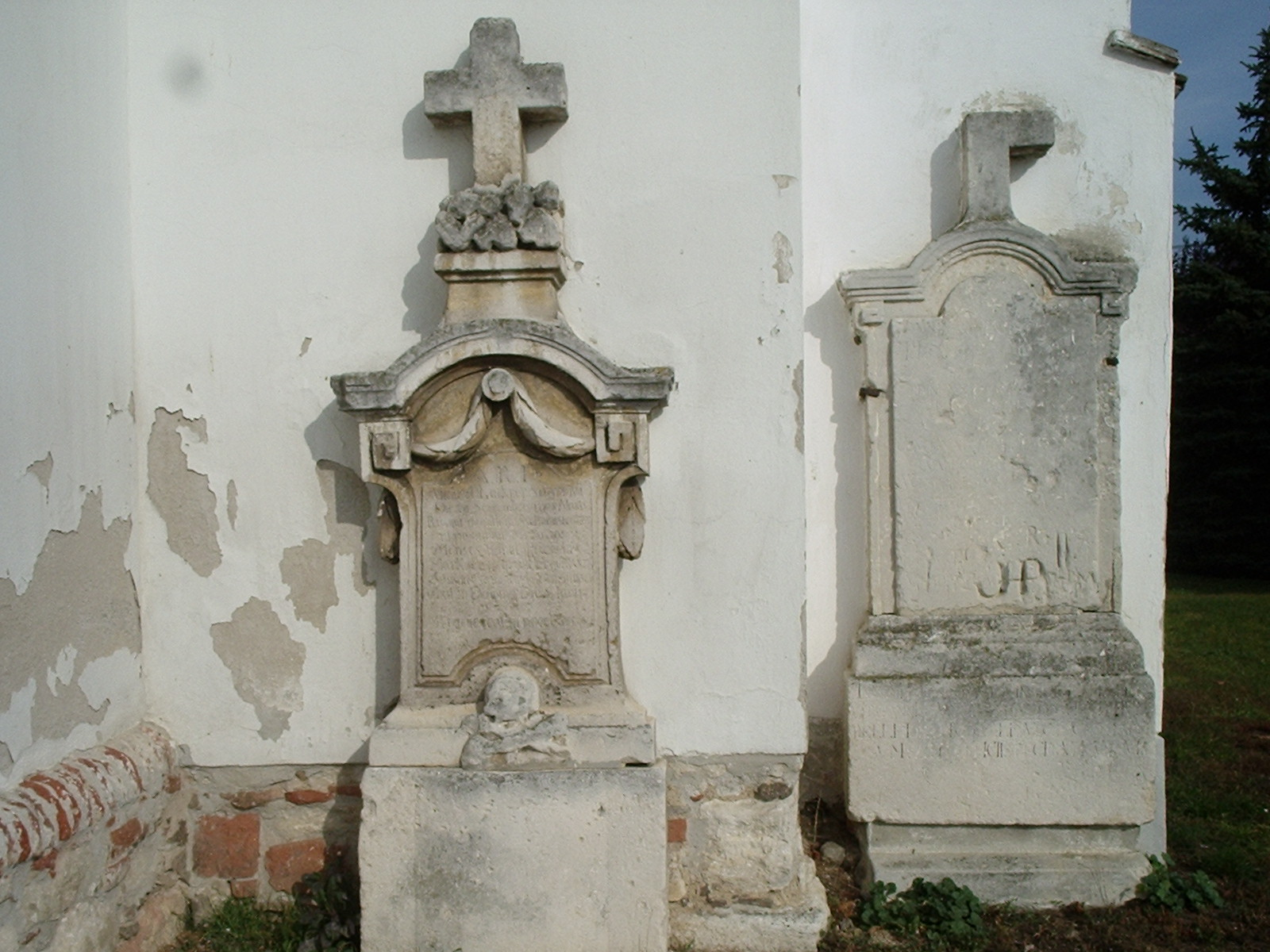 Harka, Árpád-kori templom